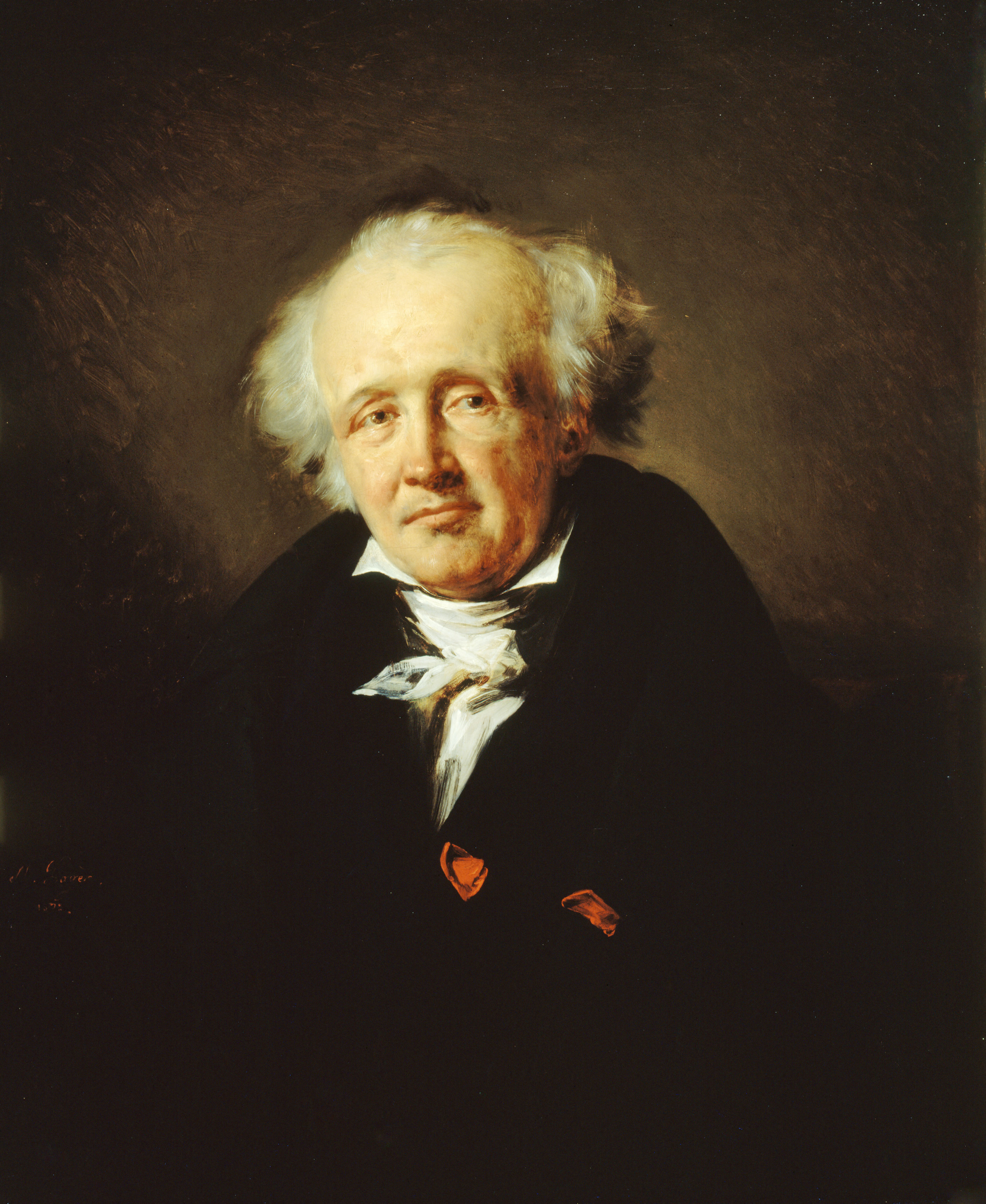 Portrait de Marc-Antoine Jullien, dit de Paris (1775-1848), journaliste et écrivain politique, Paris, musée Carnavalet, 1832.